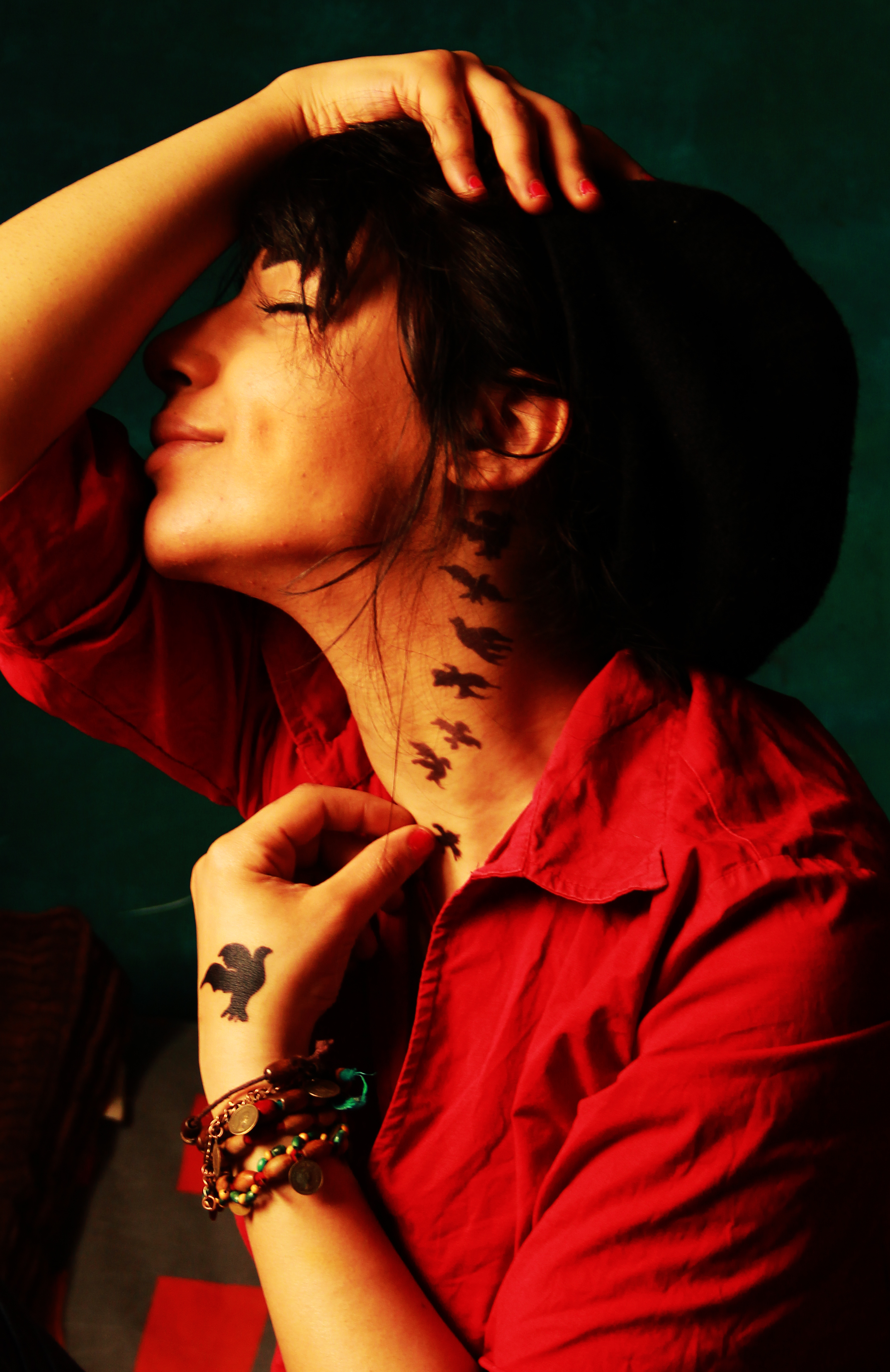 L'artista palestinese Nidaa Badwan